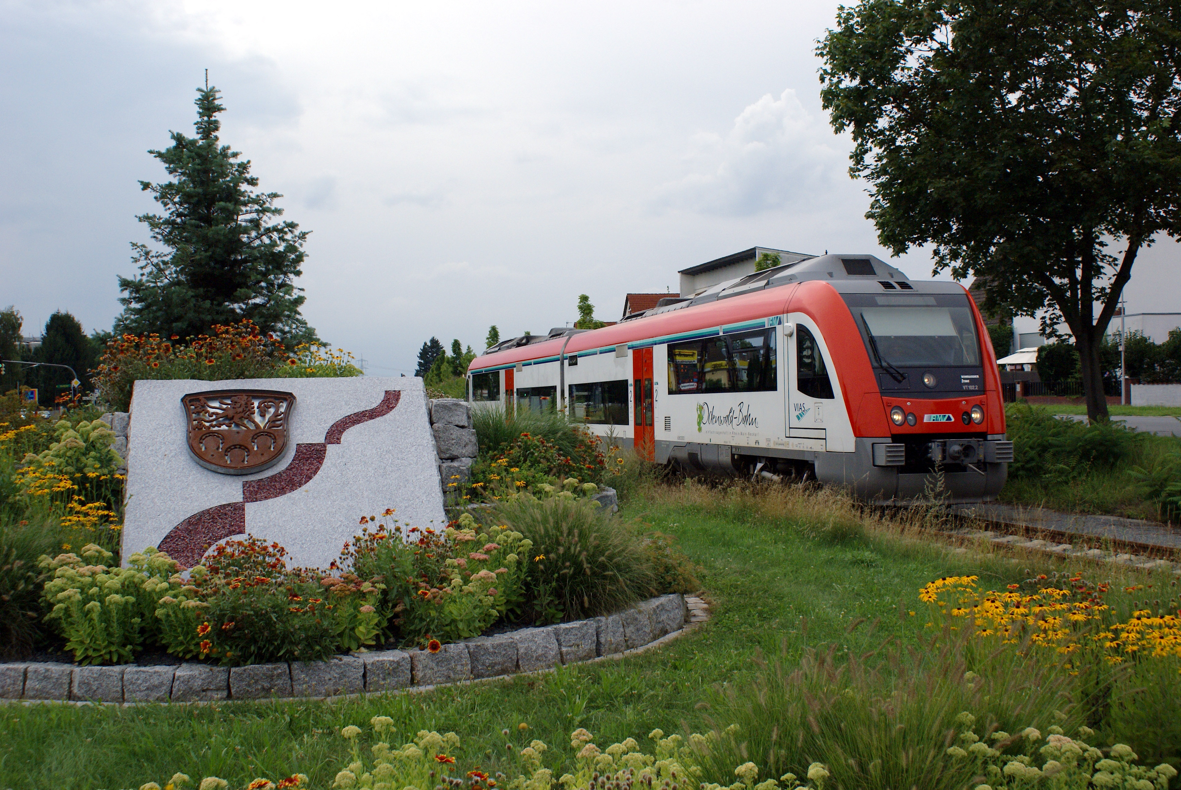 Deitsch: Dieseltriebzug VT 102 des EVU Vias bei der Ausfahrt aus dem Bf Pfungstadt